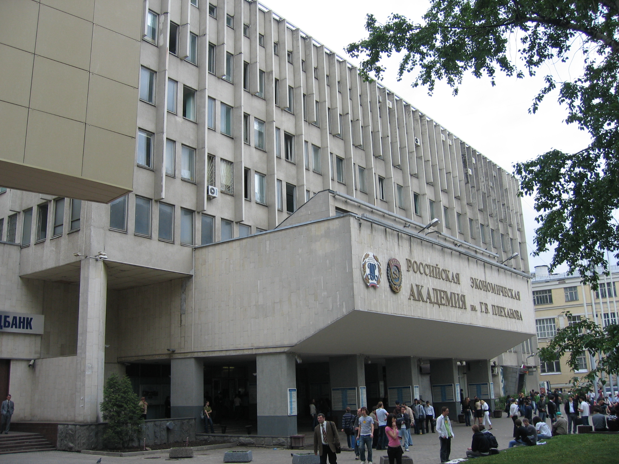 Российская экономическая академия им. Г. В. Плеханова главный корпус